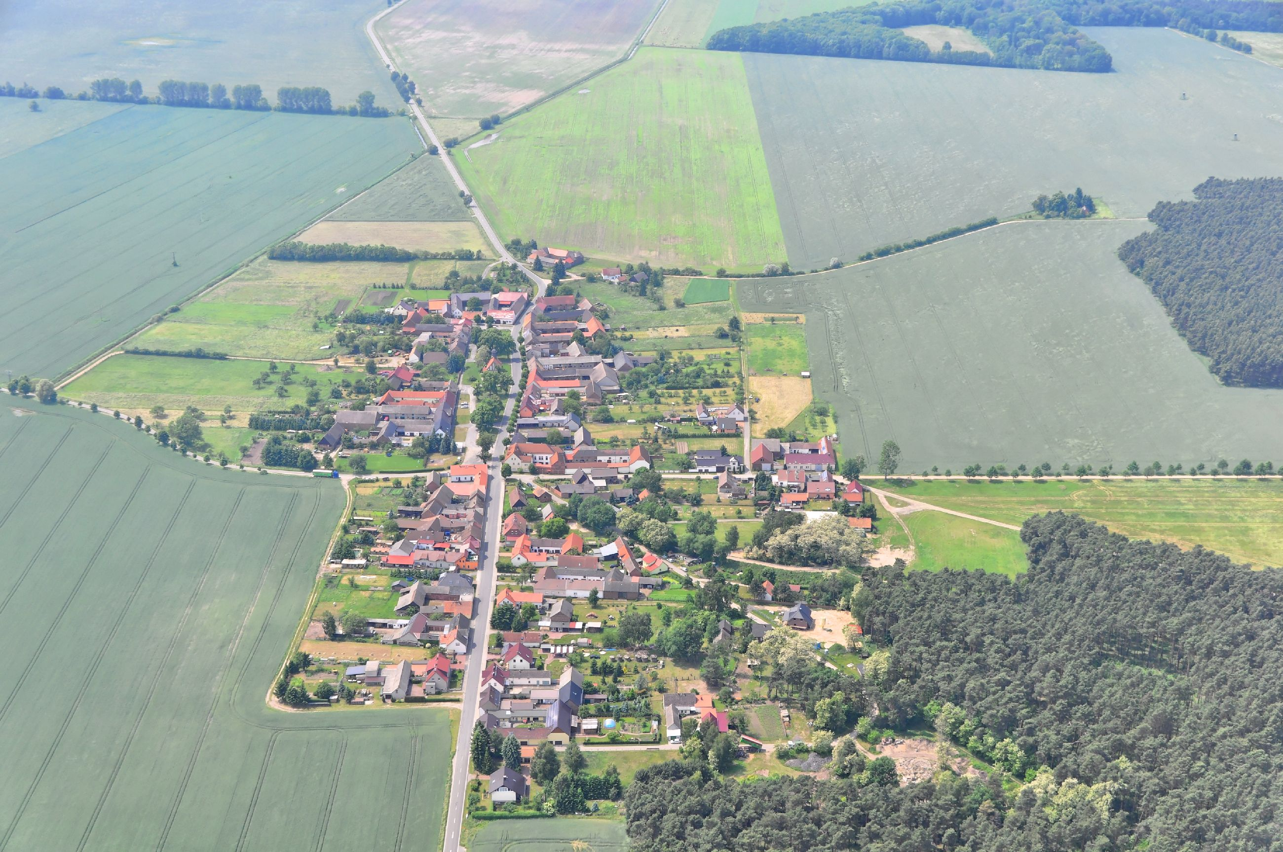 Friedersdorf bei Sonnewalde auf einem Überführungsflug vom Flugplatz Schwarzheide-Schipkau über Potsdam, Lüneburg zum Flugplatz Nordholz-Spieka